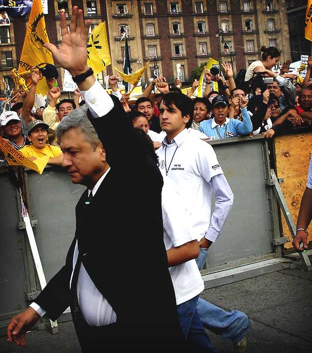 Andres Manuel Lopez Obrador walking back to his office after speaking to the people at the Zocalo in Mexico Andres Manuel Lopez Obrador caminando hacia su oficina después de haber hablado con la gente reunida en el zócalo HAGAMOS CAMPAÑA QUE SE NOS QUIERE IR! RECUPERÉMOSLO!